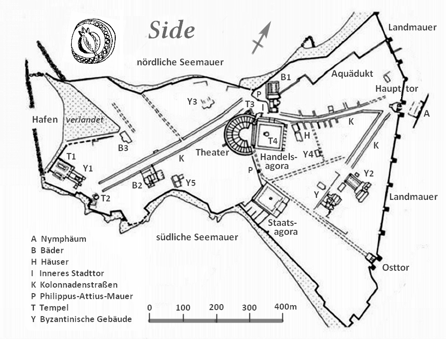 Übersicht über das antike Stadtgebiet von Side